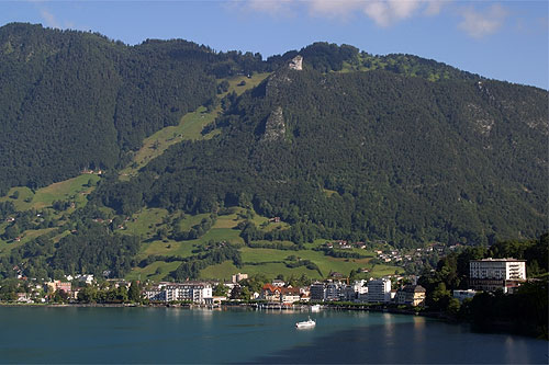 Brunnen am Vierwaldstättersee (Nr. 03.1-8760)